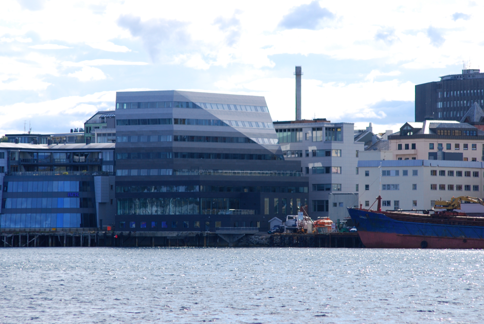 Luftfartstilsynets hovedkvarter i Bodø, sett fra sjøsiden. Bygningene sett fra venstre: NRK Nordland, Luftfartstilsynet, NAV. Helt til høyre, fra nederst til øverst: Uniongården, Næringslivets hus og Nordlandssykehuset.